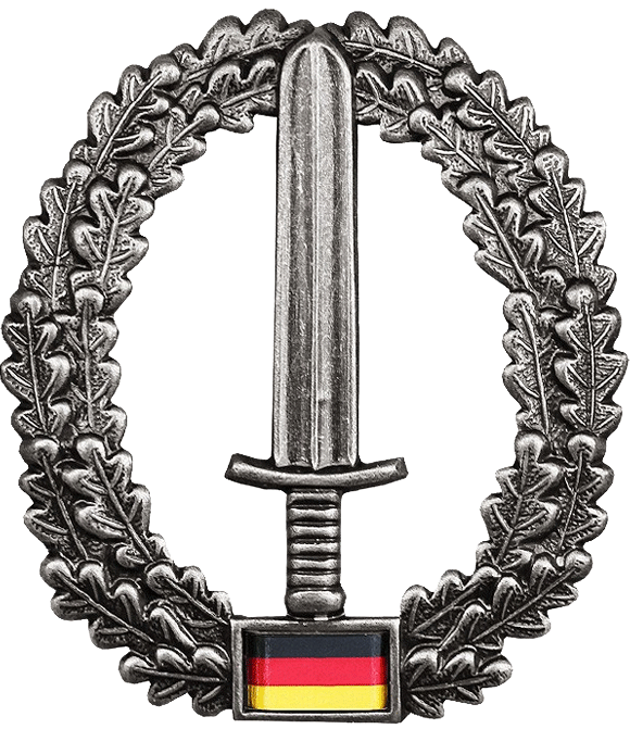 Barettabzeichen der Kommando Spezialkräfte, (KSK) der Bundeswehr Barettfarbe: Bordeauxrot Maße: Hoch: 53mm Breit: 46mm Ausführung: altsilber, Metall